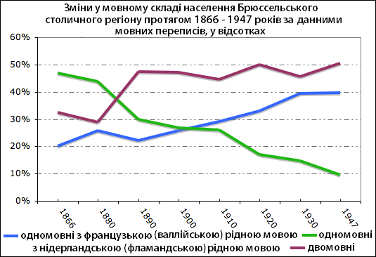 Зміни у мовному складі населення Брюссельського столичного регіону протягом 1866 - 1947 років за данними мовних переписів, у відсотках.